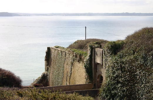 Entrée du Fort de la Pointe du Petit Minou